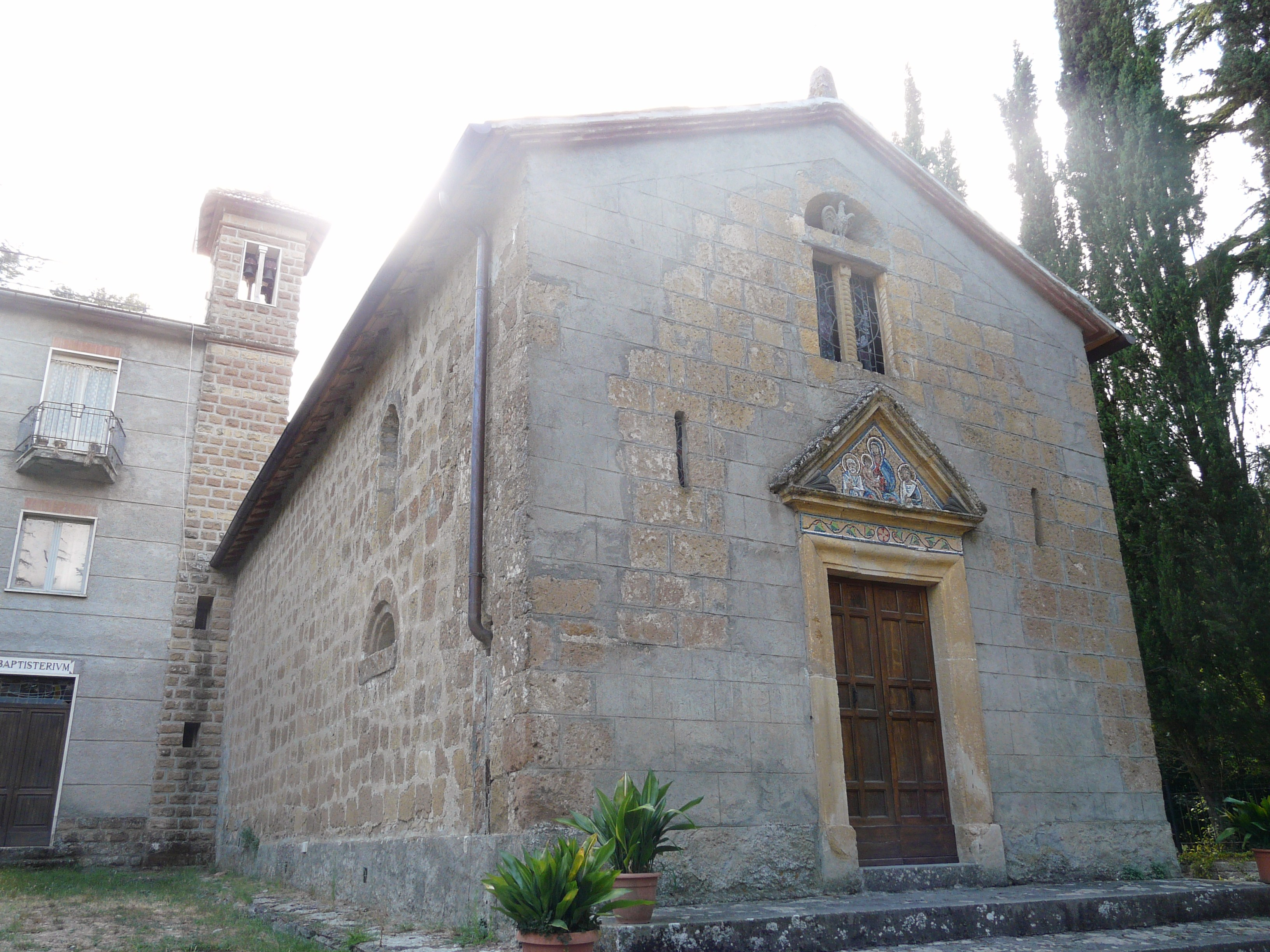 Chiesa di Santa Maria delle Colonne, Grotte di Castro (frazione Mortaro), Lazio, Italia